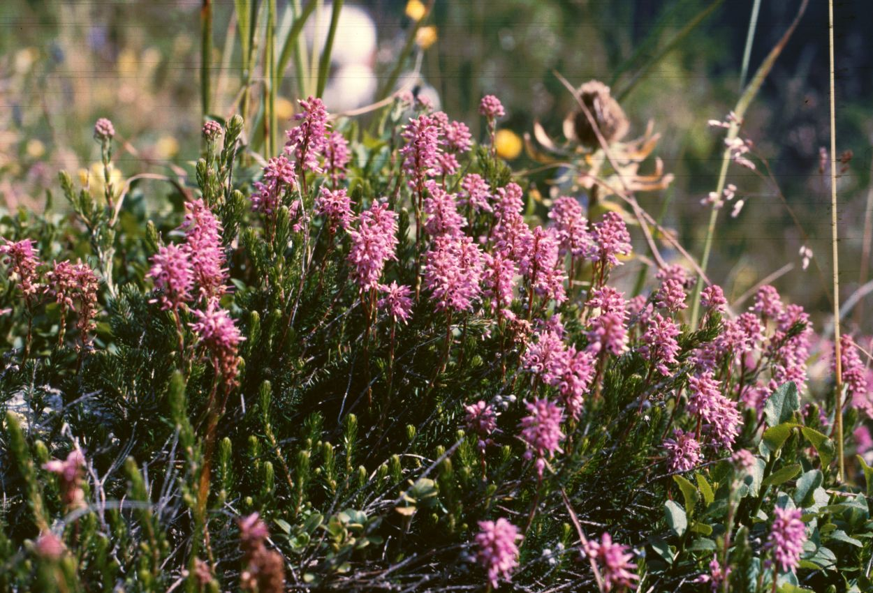 Ährenheide (Erica spiculifolia, Syn. Bruckenthalia spiculifolia), Heidekrautgewächse (Ericaceae) - Rumänien/România: Südkarpaten, Retezatgebirge, ca. 1800 m Seehöhe